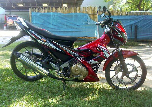 Suzuki Raider 150